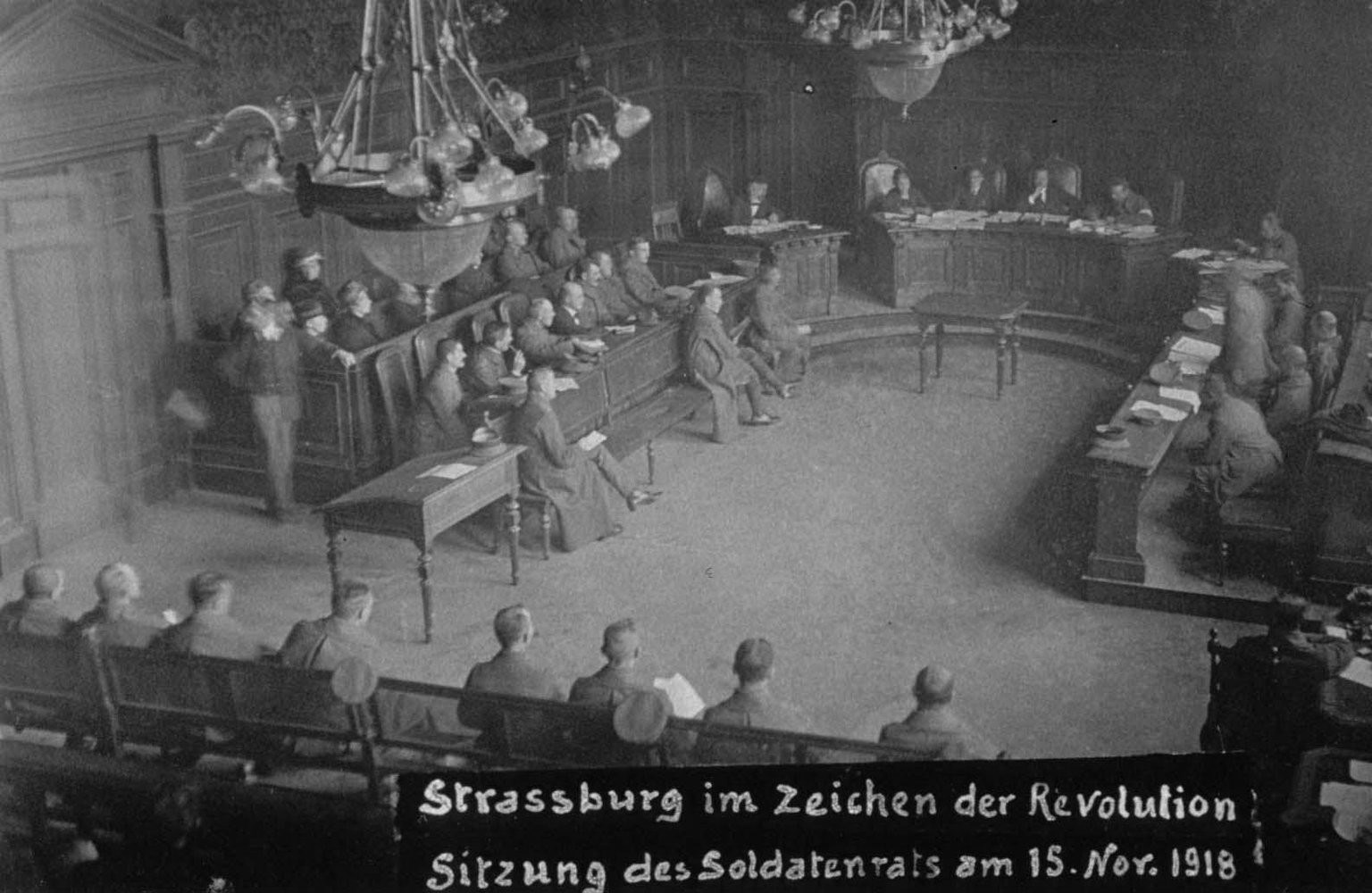 Strasbourg durant la Révolution. Conseil des soldats à Strasbourg le 15 novembre 1918